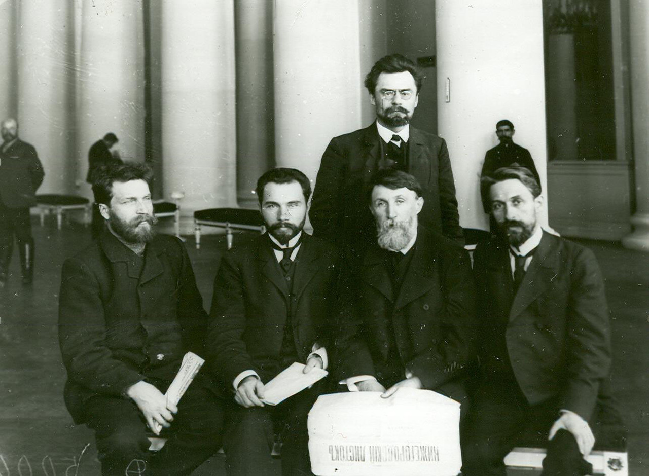 The members of the second Russian State Duma from Nizhegorodskaya, Samara and Kursk Governorates, 1907. First line: Mikhail Fokeev (Nizhniy Novgorof), Ivan Mushenko (Kursk), Niphont Dologopolov (Nizhniy Novgorof), Terentiy Kireev (Nizhniy Novgorof), Second line: Vasiliy Arhangelski (Samara)